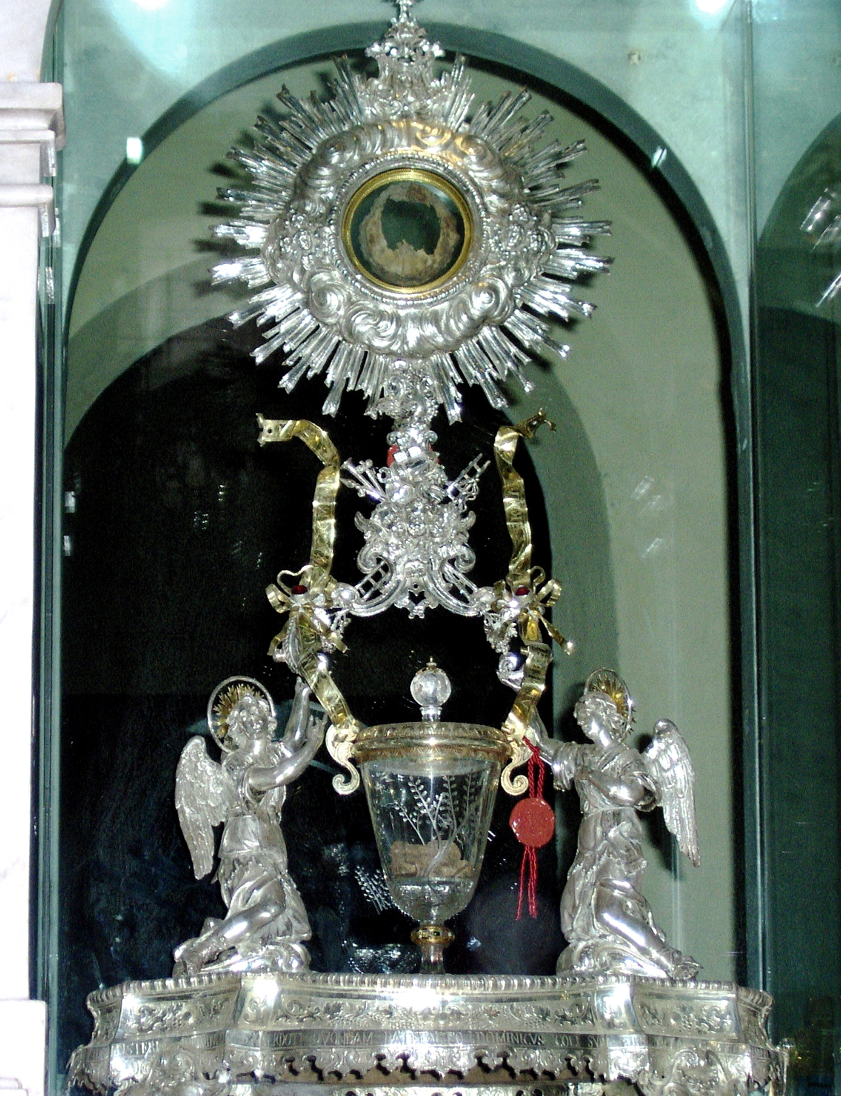 Miracolo Eucaristico di Lanciano - foto dal vivo.JPG Foto fatta da me, con flash, mentre passavo davanti alla teca. Ulteriori dettagli fotografici cliccando su proprietà del file.